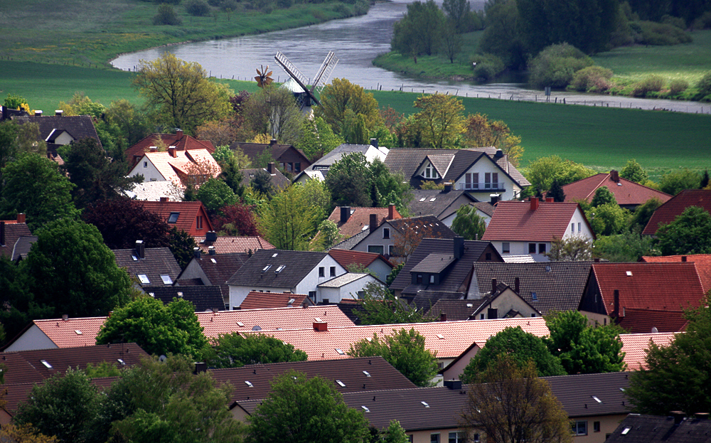 Mühlendorf Tündern an der Weser